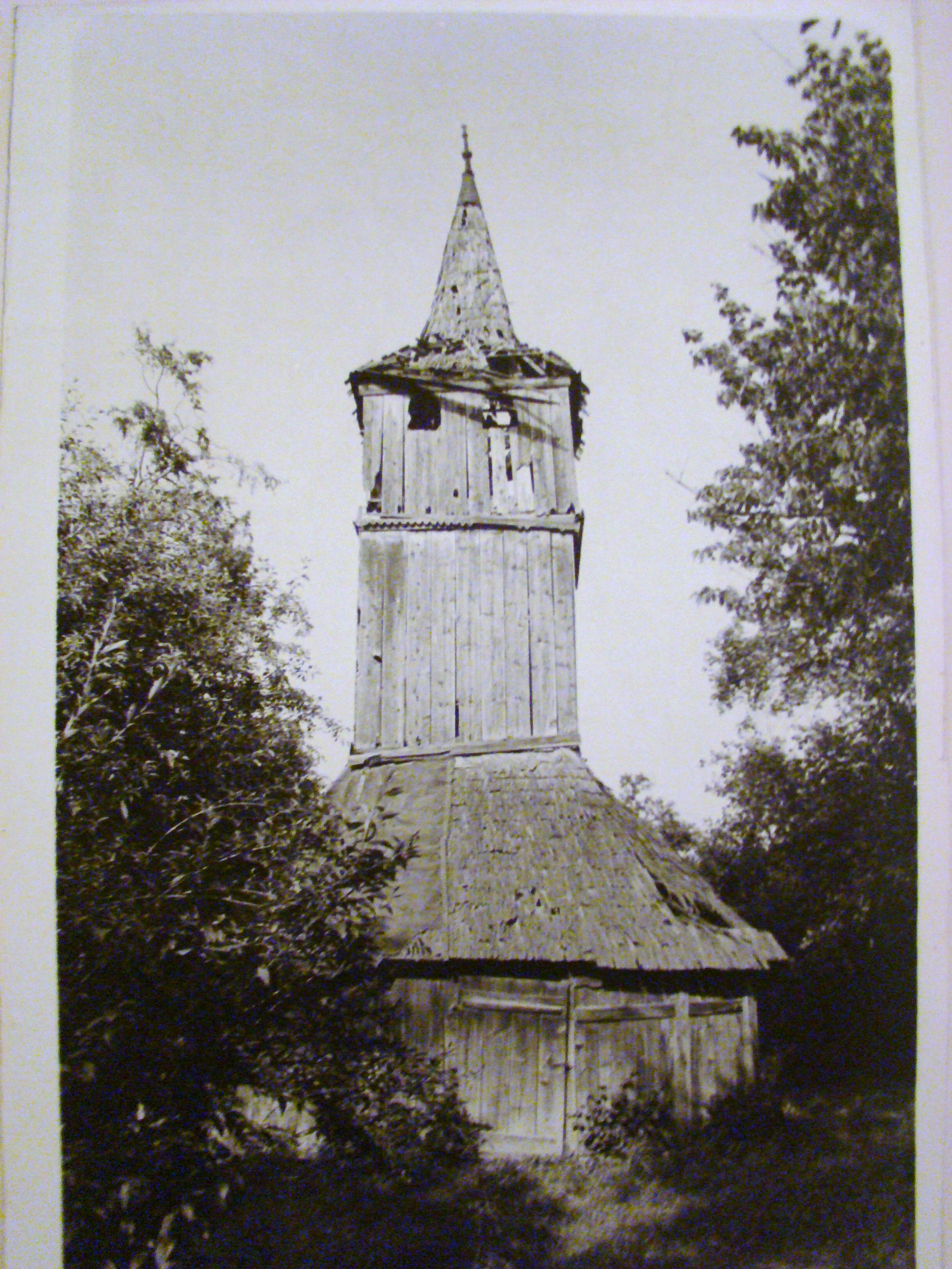 Biserica de lemn din Mintia, Hunedoara, mutată în incinta Muzeului Țăranului Român din București